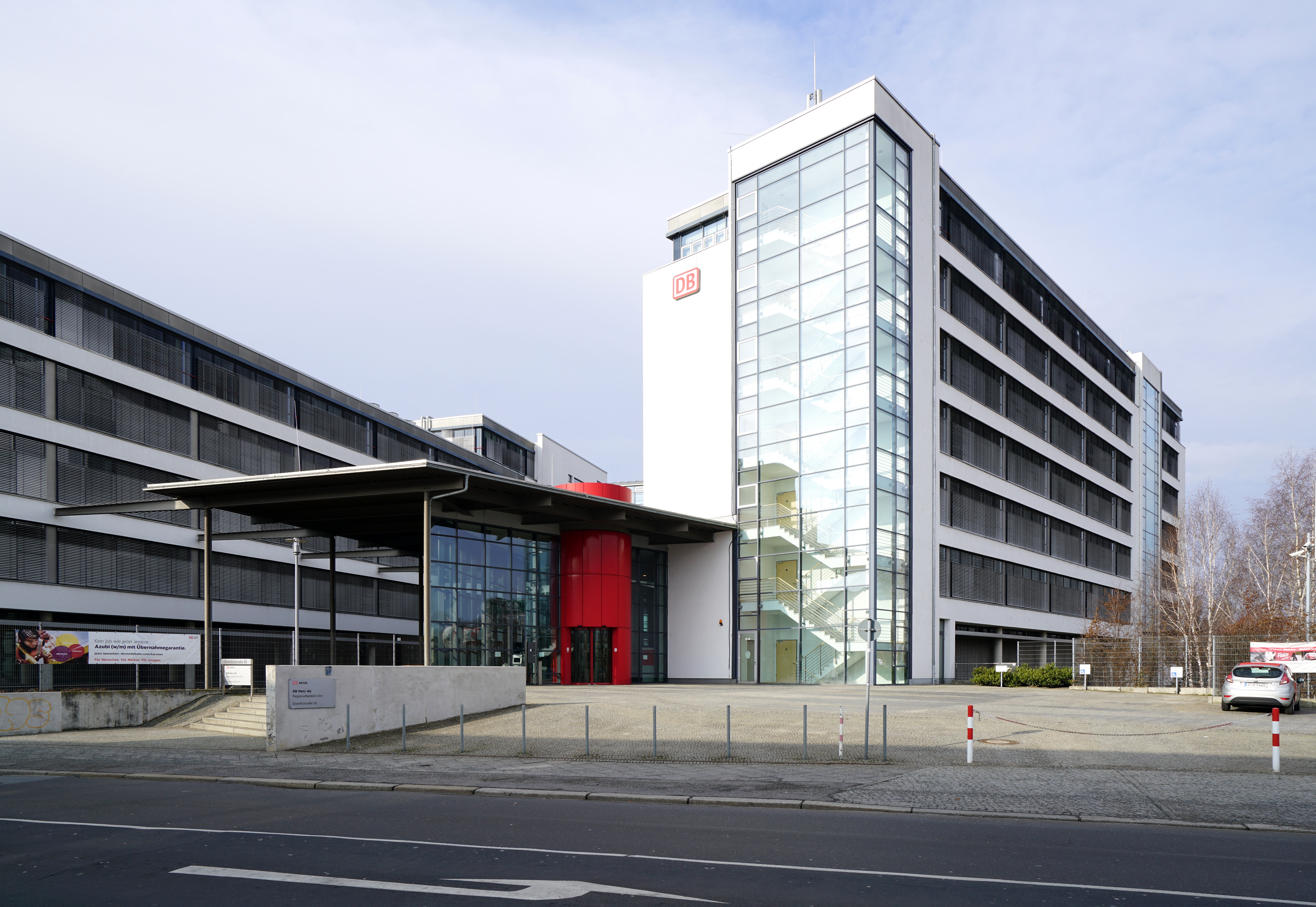 Die Betriebszentrale des Regionalbereichs Ost der DB Netz AG im Ortsteil Berlin-Pankow in der Granitzstraße 55 im Bezirk Pankow in Berlin